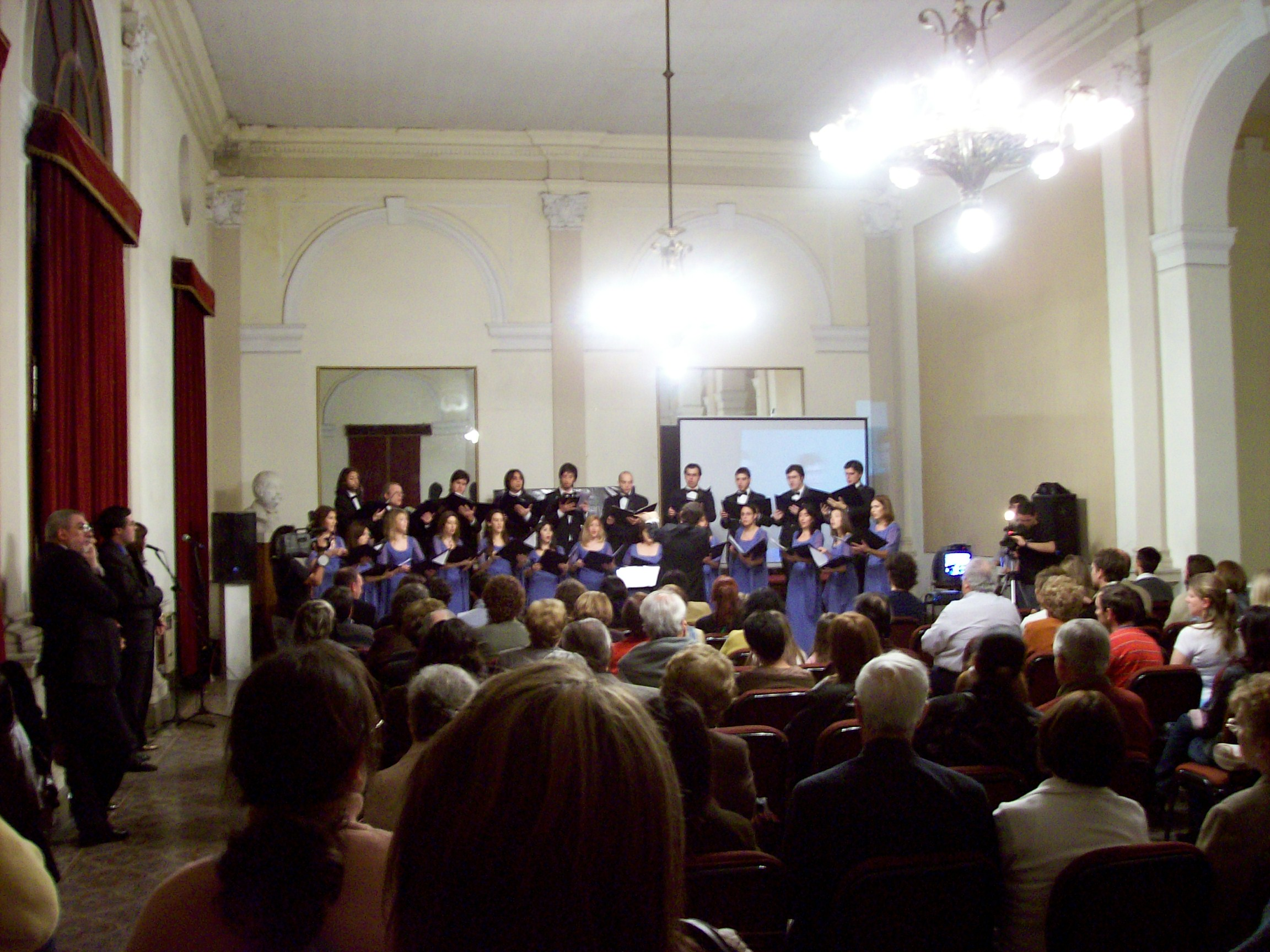 Foyer of the Rafael de Aguiar Municipal Theater in San Nicolás de los Arroyos, Buenos Aires Province, Argentina.